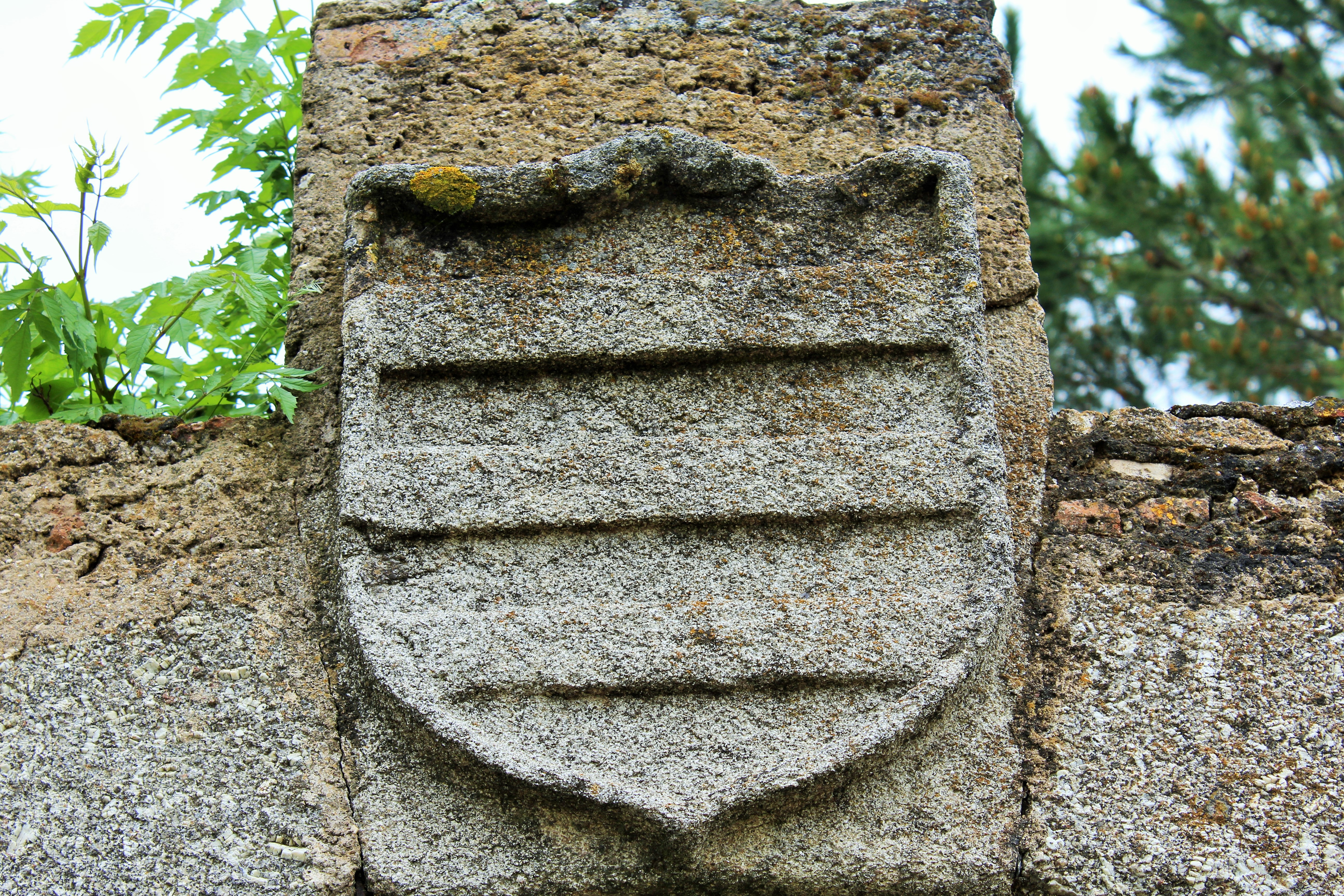 Castillo convertido en lugar de eventos. A unos 10 km. de Cáceres